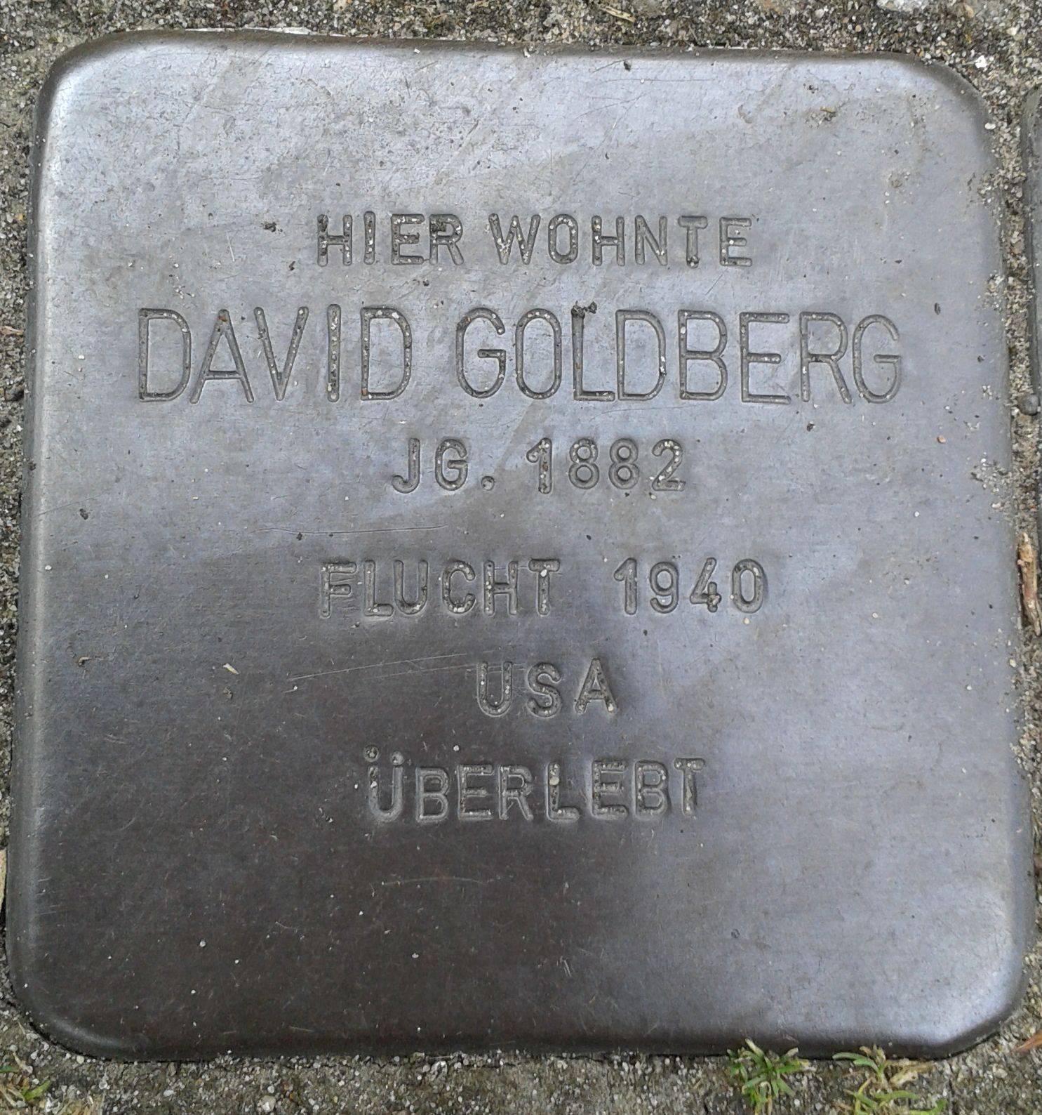 Stolperstein Datteln Carl-Gastreich-Straße 5 David Goldberg